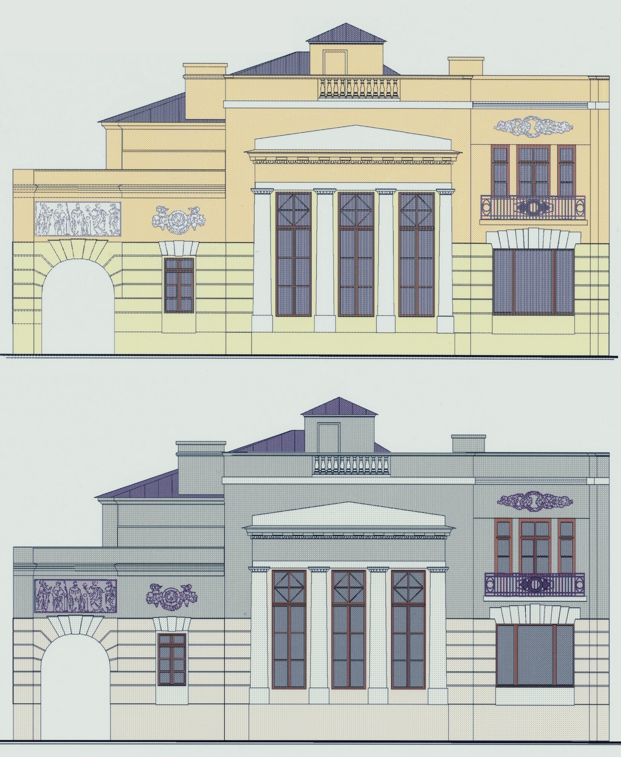 Компьютерное цветовое решение фасада здания